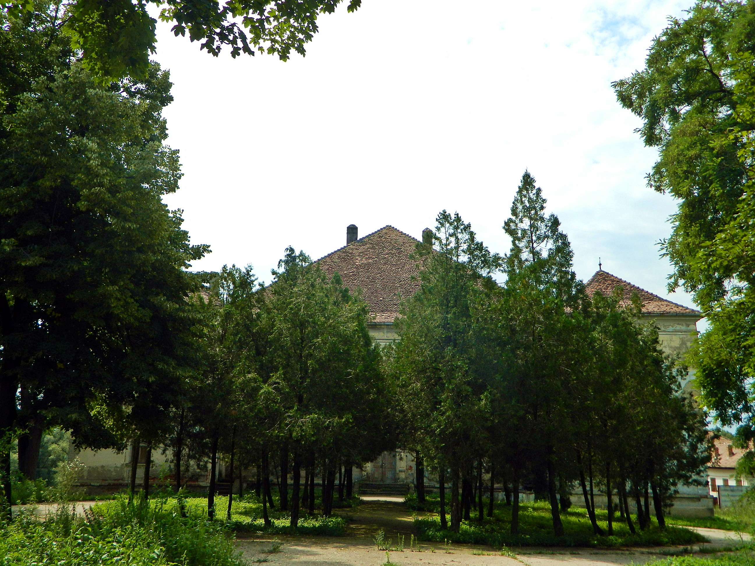 Conacul Bethlen - Parc 03